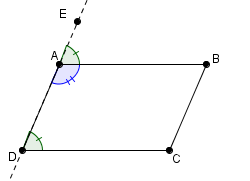 os ângulos consecutivos do paralelogramo são complentares